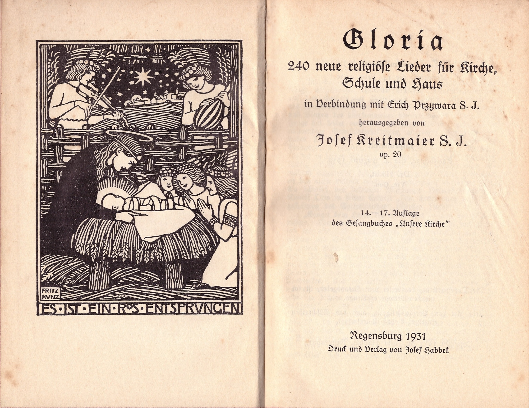 Gloria, katholisches Liederbuch von 1931, herausgegeben von Josef Kreitmaier SJ, der auch die meisten Melodien komponierte; die meisten Texte sind von Erich Przywara SJ, die Titelgrafik von Fritz Kunz (1868-1947)